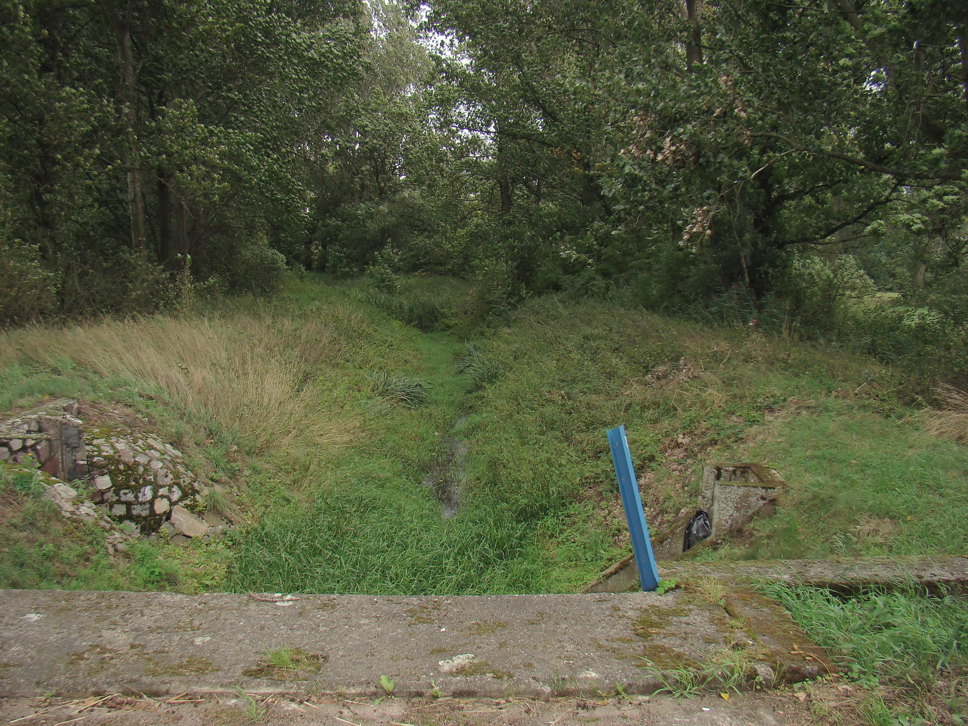 Środkowy Kanał Obry , ok 70 m za wypływem z Północnego Kanału Obry